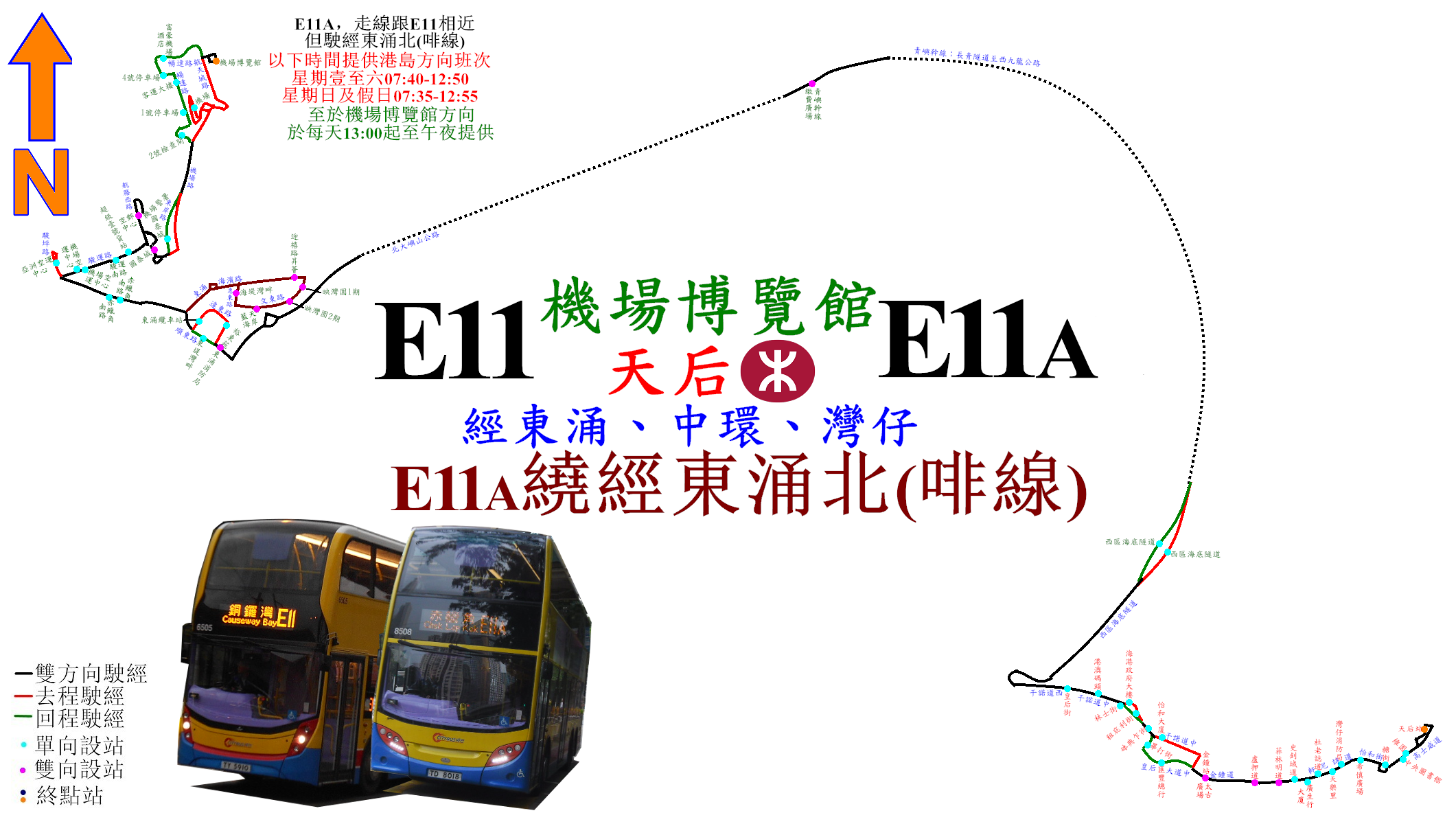 中文（香港）: 城巴E11路的走線圖